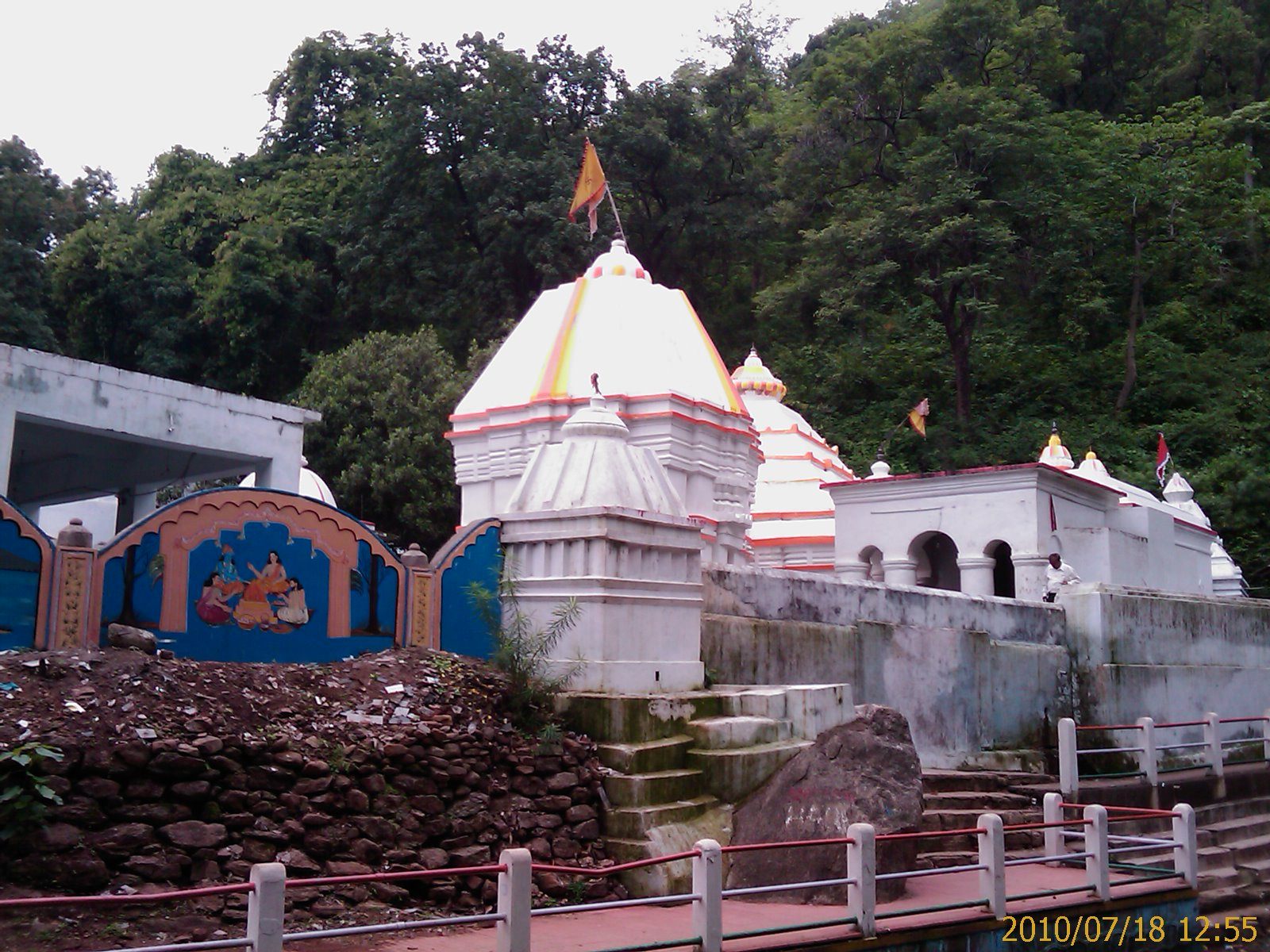 Harishankar Temple